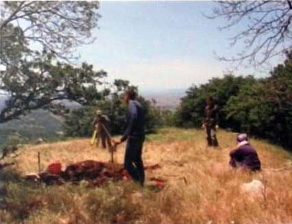 foto castel vaiolo, io sono l'autore, resti di castel vaiolo, io sono l'autore e rilascio la foto nel pubblico dominio